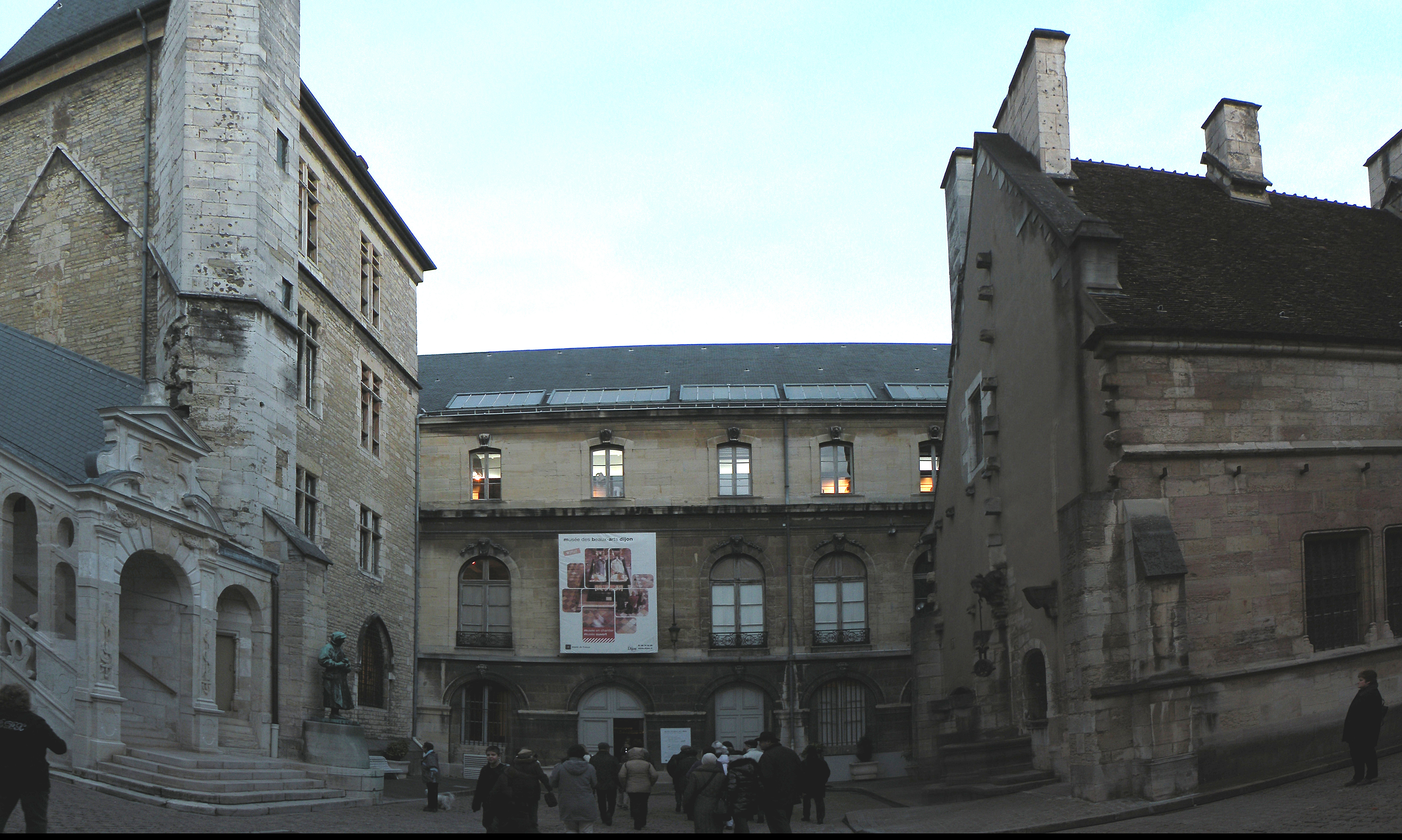 Дижон. Двор здания рыцарей ордена золотого Руна